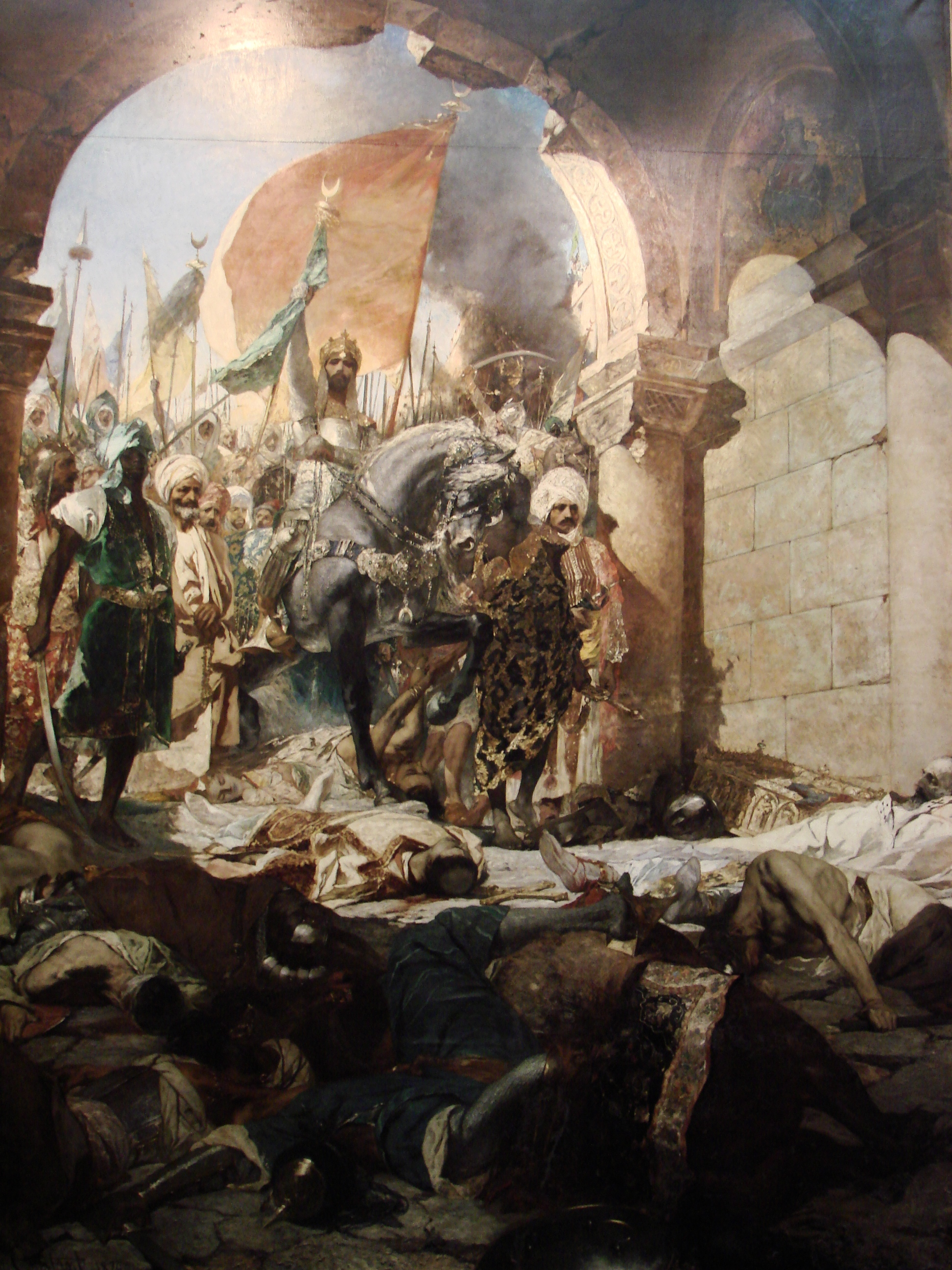 Musée des Augustins, ville de Toulouse, région Midi-Pyrénées (France) : L'entrée du sultan Mehmet II à Constantinople, le 29 mai1453, 1876, par Jean-Joseph-Benjamin Constant (1845-1902). Huile sur toile.